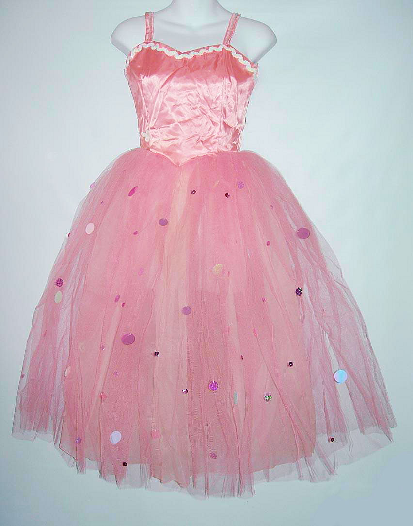 Own work